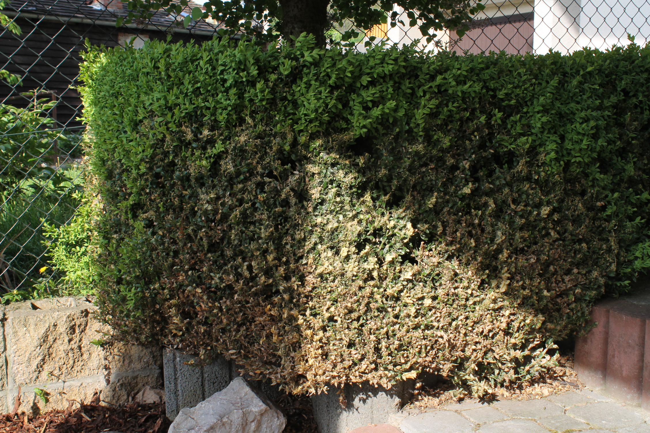 Cydalima perspectalis na zimostrázu Buxus sempervirens , Brno Komín, Czech republic, invasive insect.